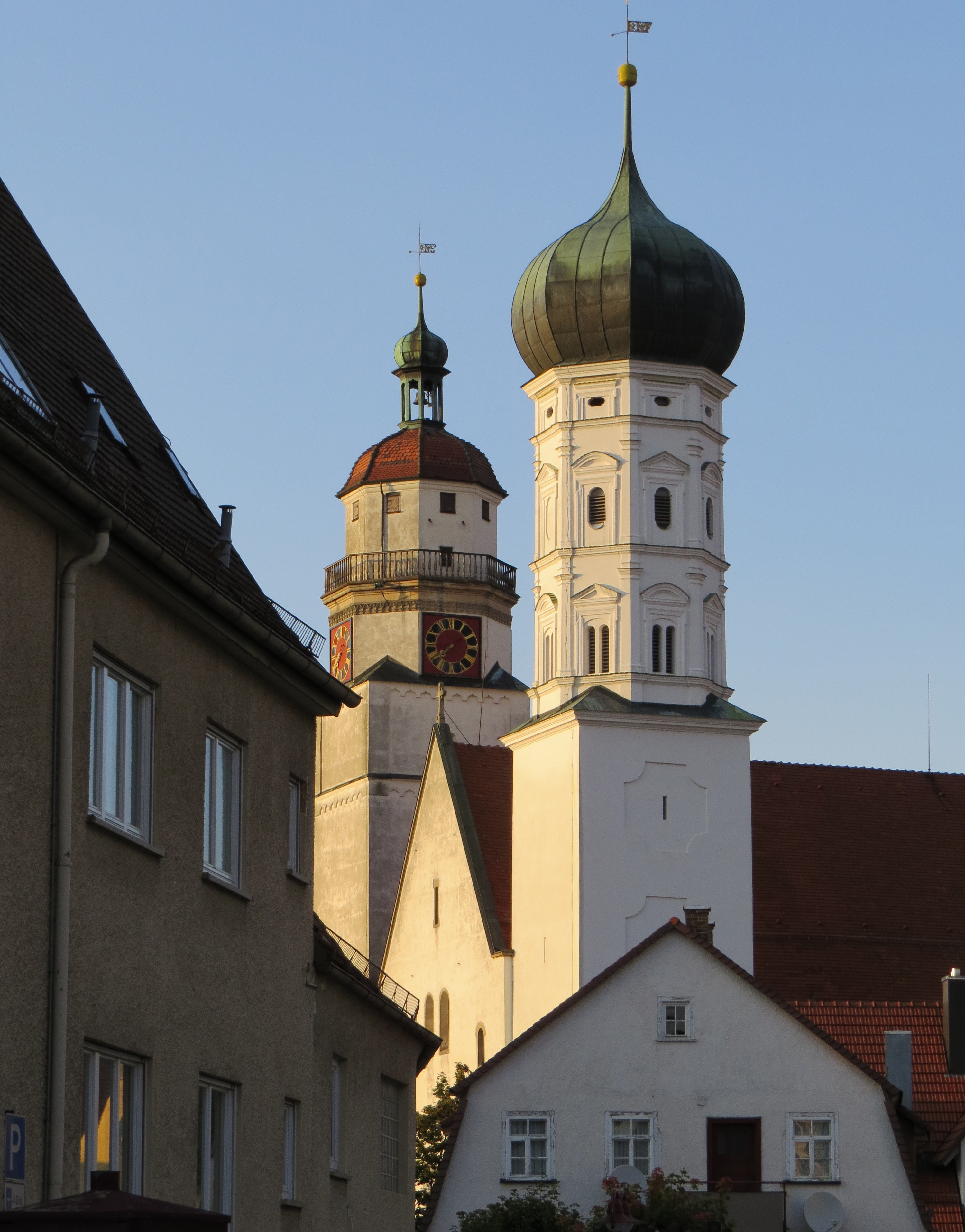 Türme der Stadtkirche in Giengen an der Brenz